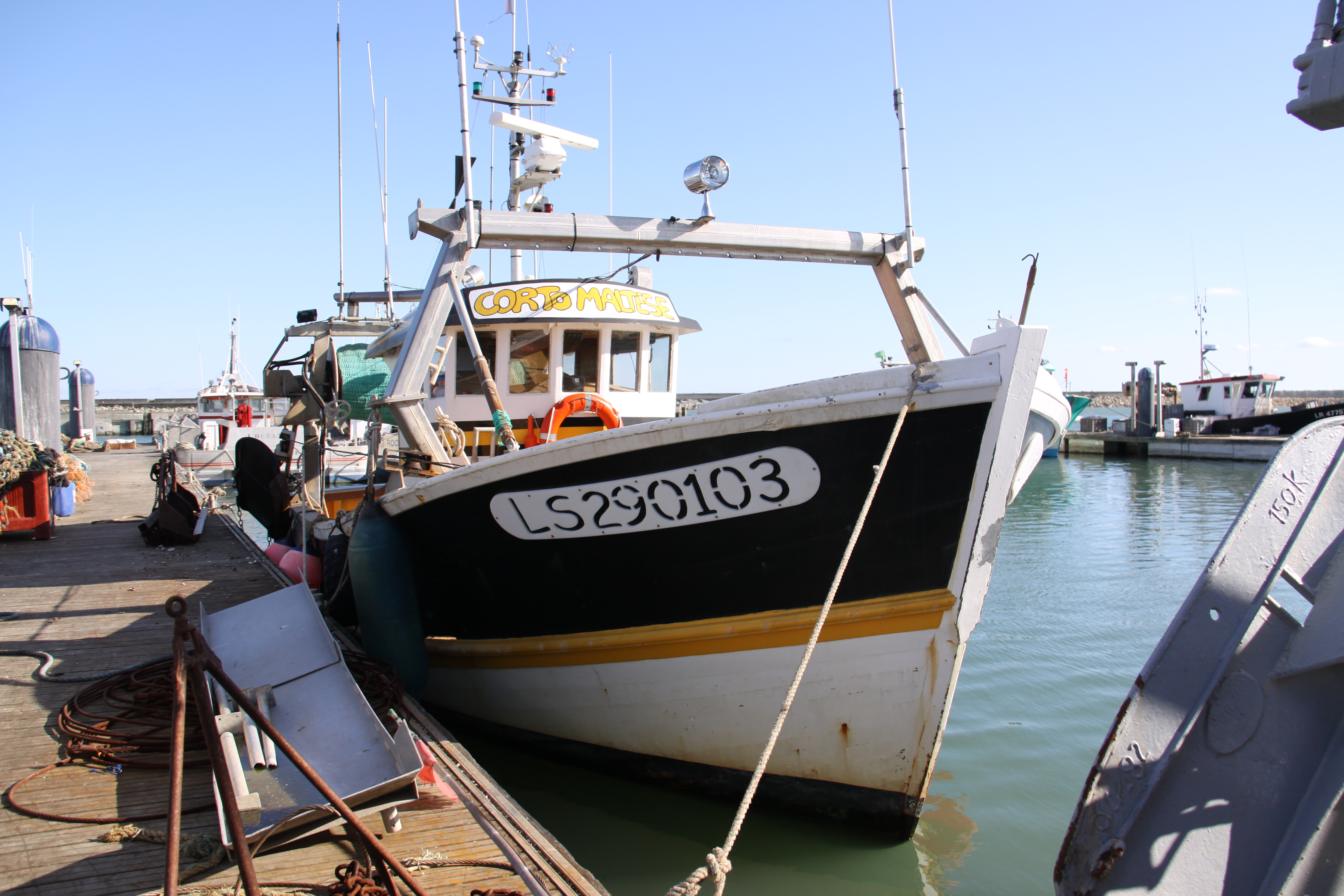 Le chalutier "Corto Maltese" amarré dans le Bassin des Coureauleurs du port de pêche de Chef de Baie. Ce bateau de pêche a été construit en 1962. Il mesure 11,10 mètres de long (LHT). Puissance moteur 61 kw. Coque en bois. Immatriculation: LS 290103. Le "Corto Maltese" est aussi utilisé en dragueur. La Rochelle, Charente Maritime, France.